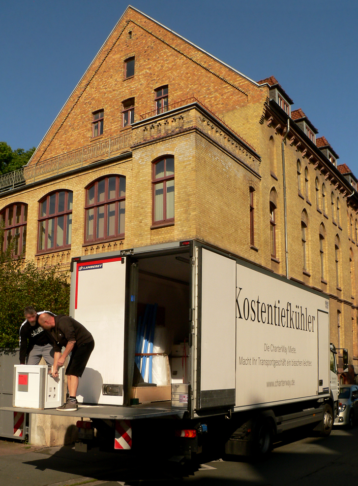 Exponatetransport vom Niedersächsischen Landesamt für Denkmalpflege in Hannover zur Ausstellung Bewegte Zeiten. Archäologie in Deutschland in Berlin, in der Klimakiste die Hand der Moorleiche Moora